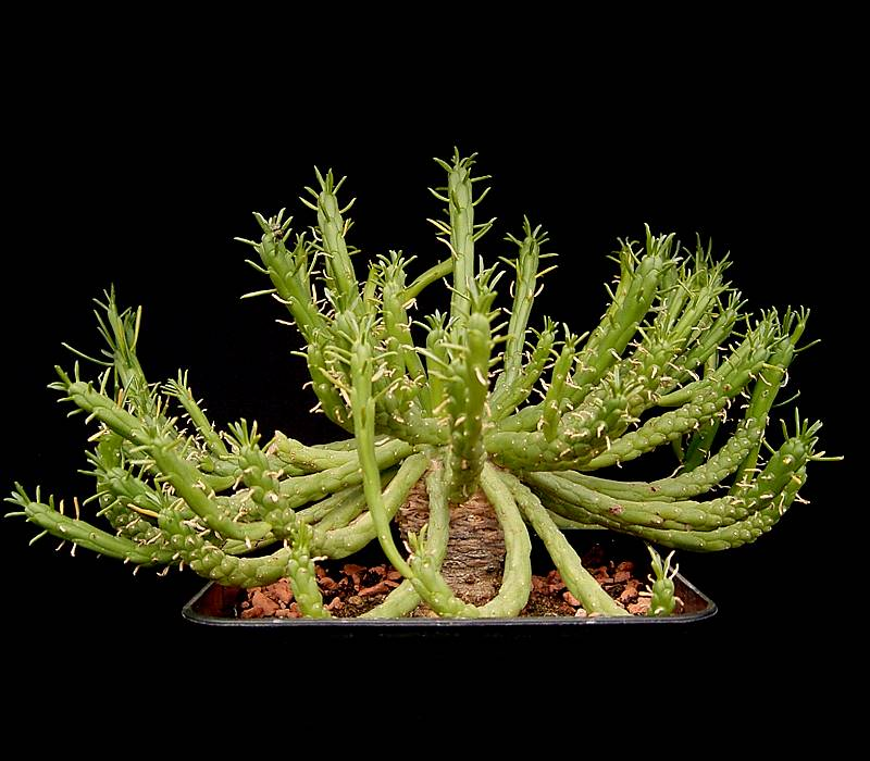 Euphorbia muirii